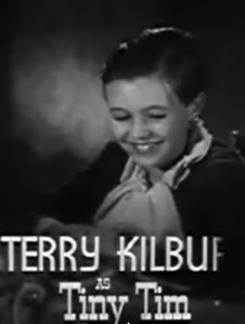 1938年製作の映画「クリスマス・キャロル」の予告編よりテリー・キルバーン